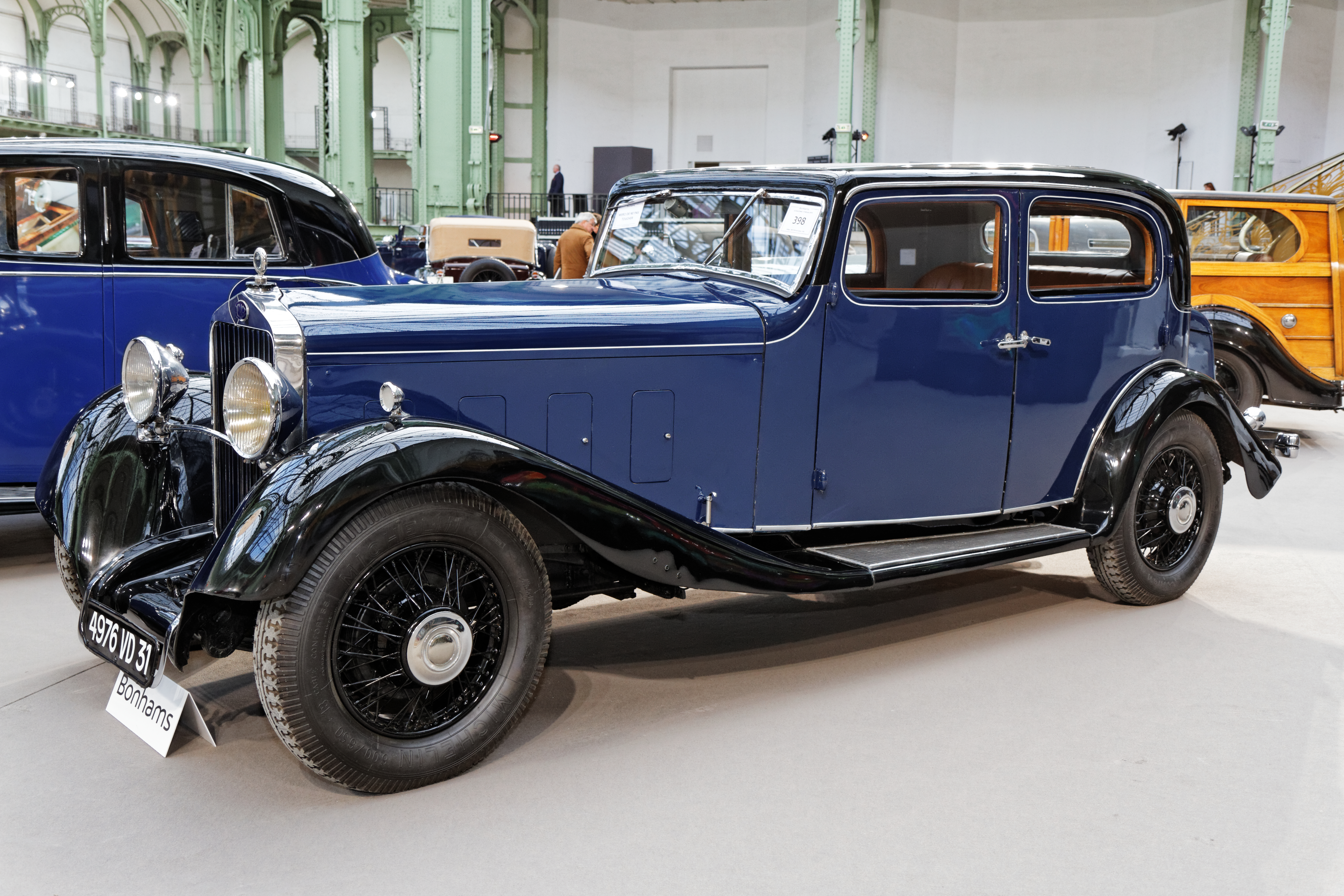 Une Delage D8/15 Pillarless Saloon au Grand Palais lors de la vente Bonhams en février 2014.